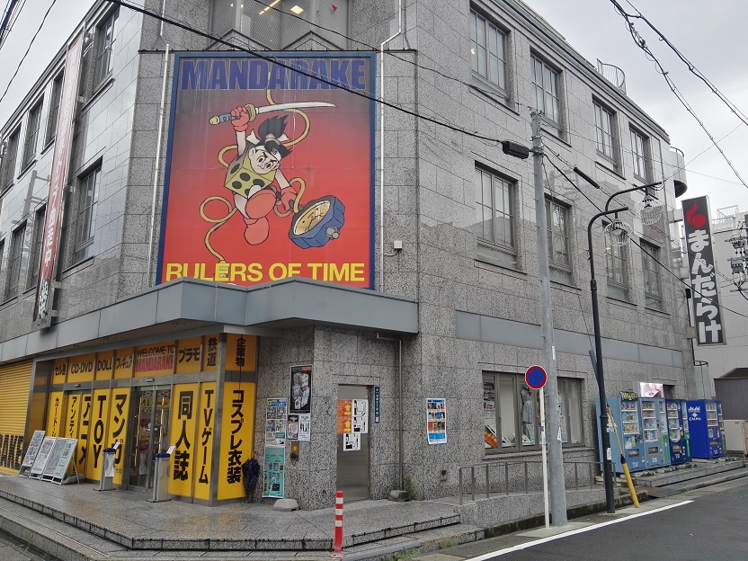 MANDARAKE, Osu, Nagoya. Formerly this building was Goodwill PC-shop.